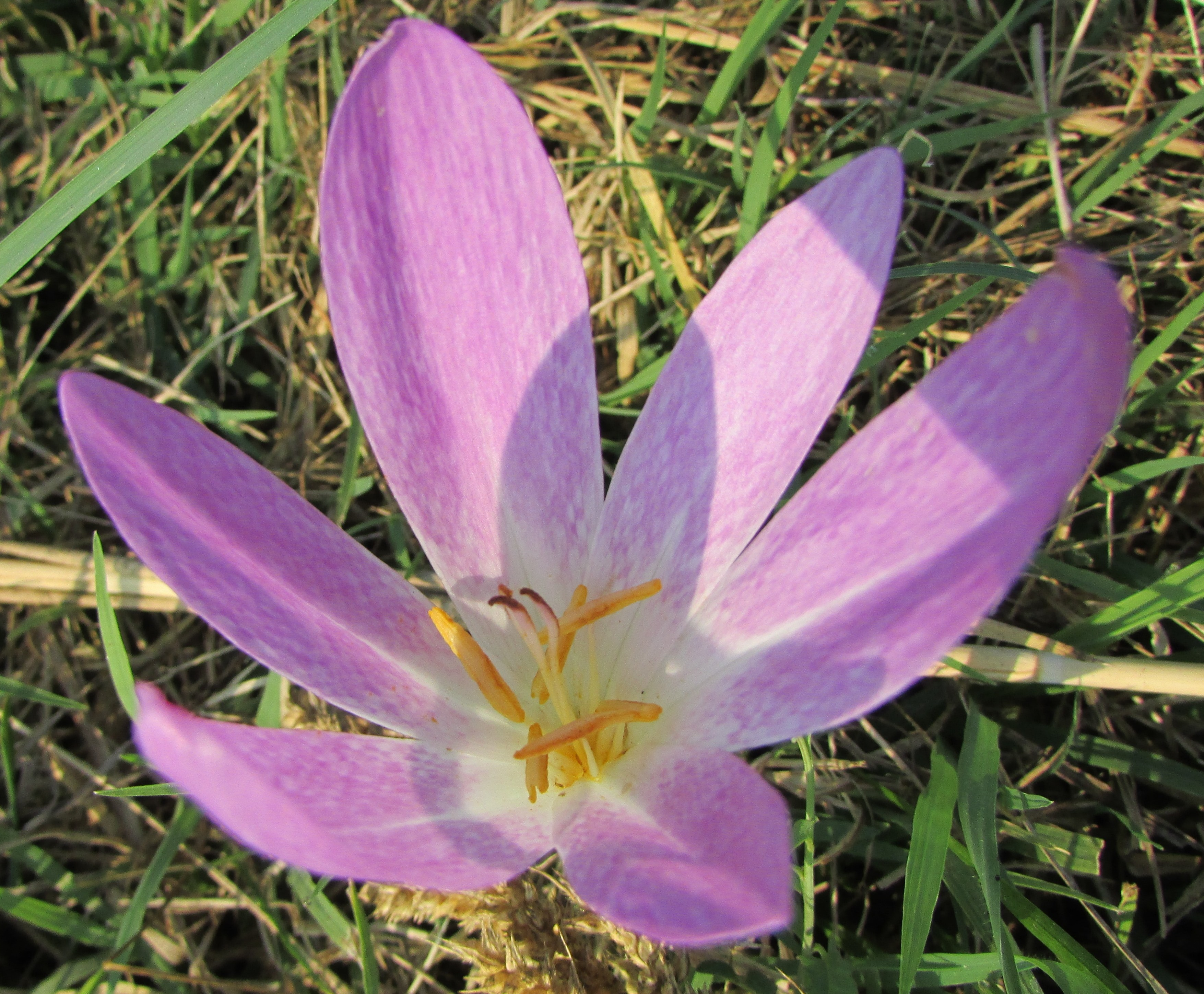 Colchico lusitano